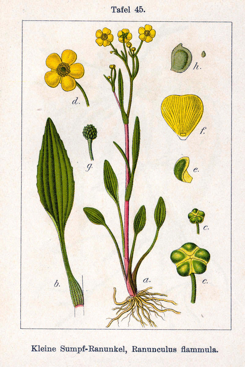 Fig. from book